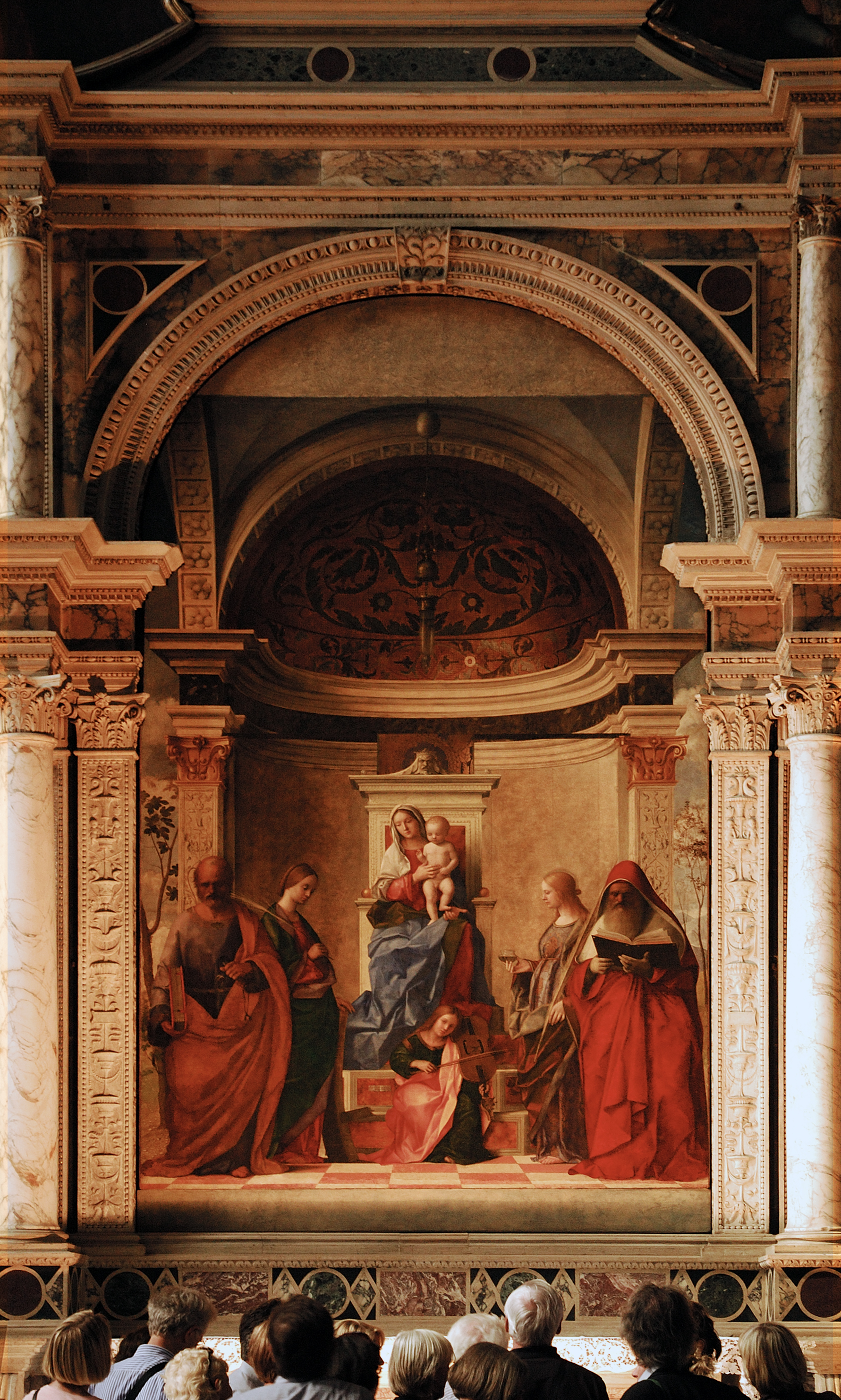 Sacra Conversatione von Giovanni Bellini, San Zaccaria Venedig.